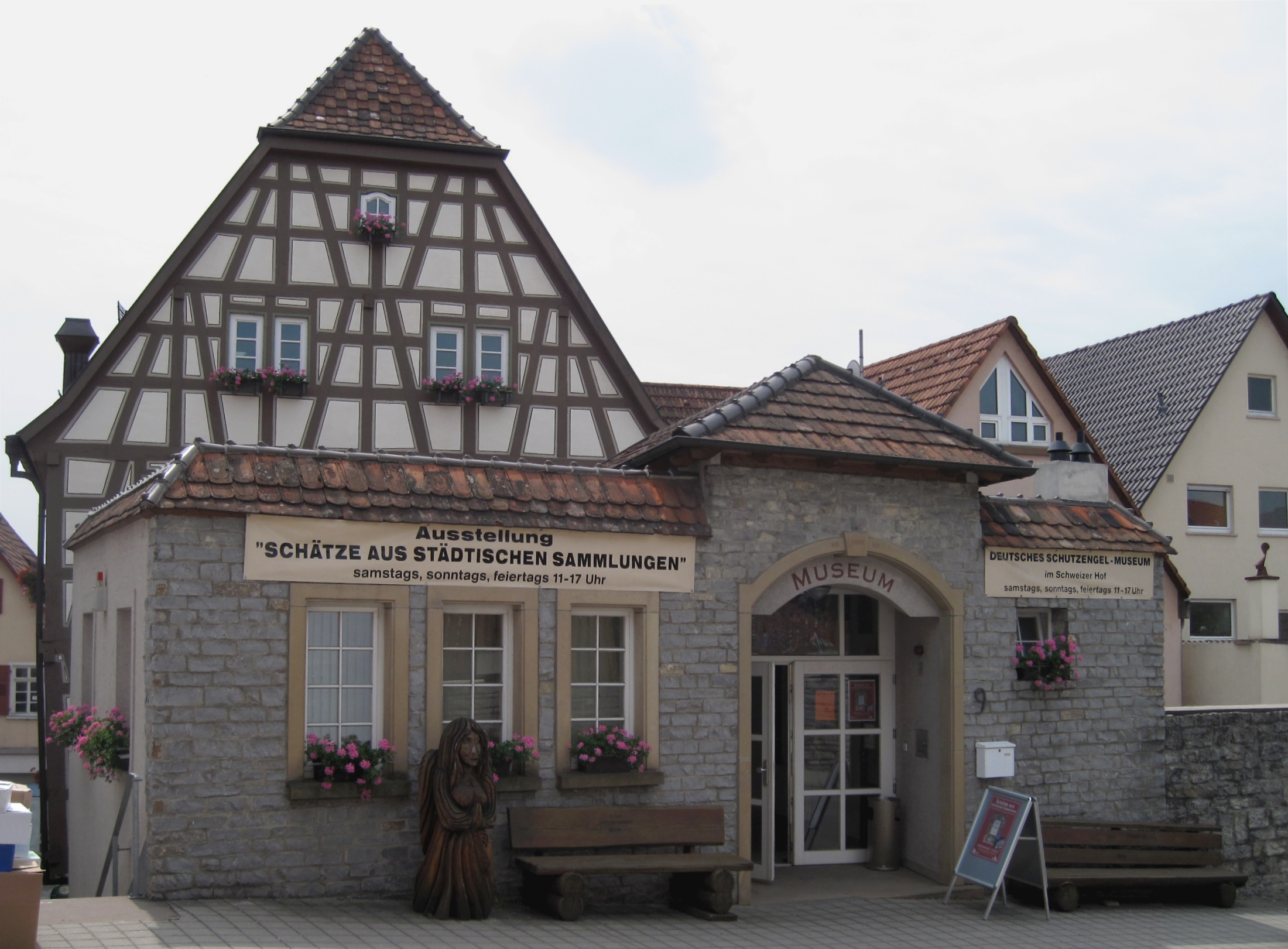 Museum im Schweizer Hof, Eingang Engelsberg 9 in Bretten.